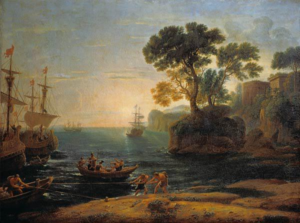 Marina con el desembarque de Eneas en el Lacio, de Claude Lorrain, 1650, óleo sobre lienzo, 102 x 137 cm, Museo Pushkin, Moscú.